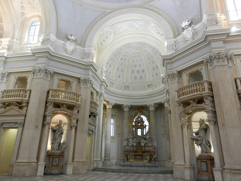 Venaria Reale - Interno della Chiesa di S. Uberto